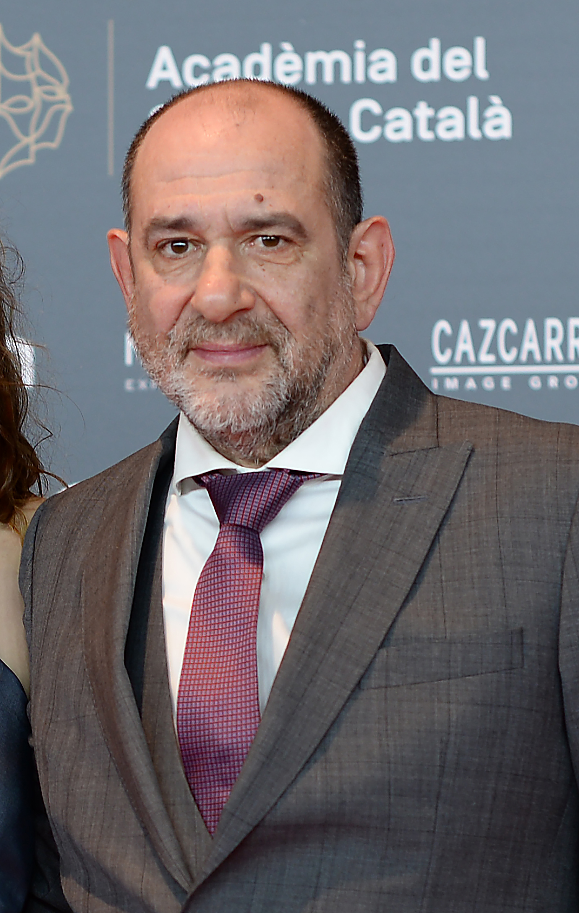 Karra Elejalde, actor, XII Premis Gaudí (2020)